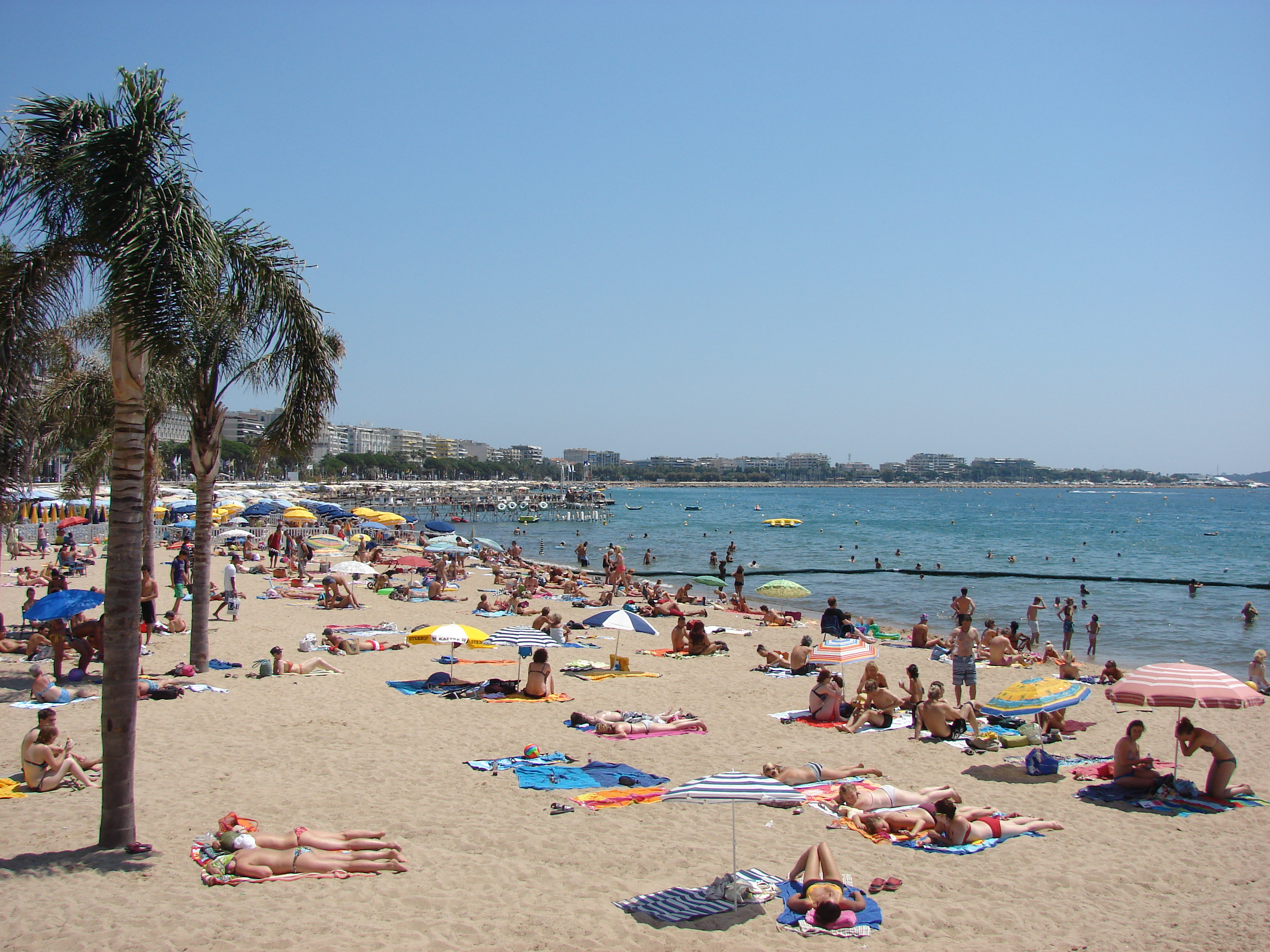 Plage de la Croisette, Cannes, Provence-Alpes-Côte d'Azur, France